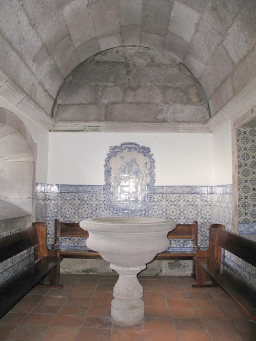 Baptistério da Igreja das Lajes